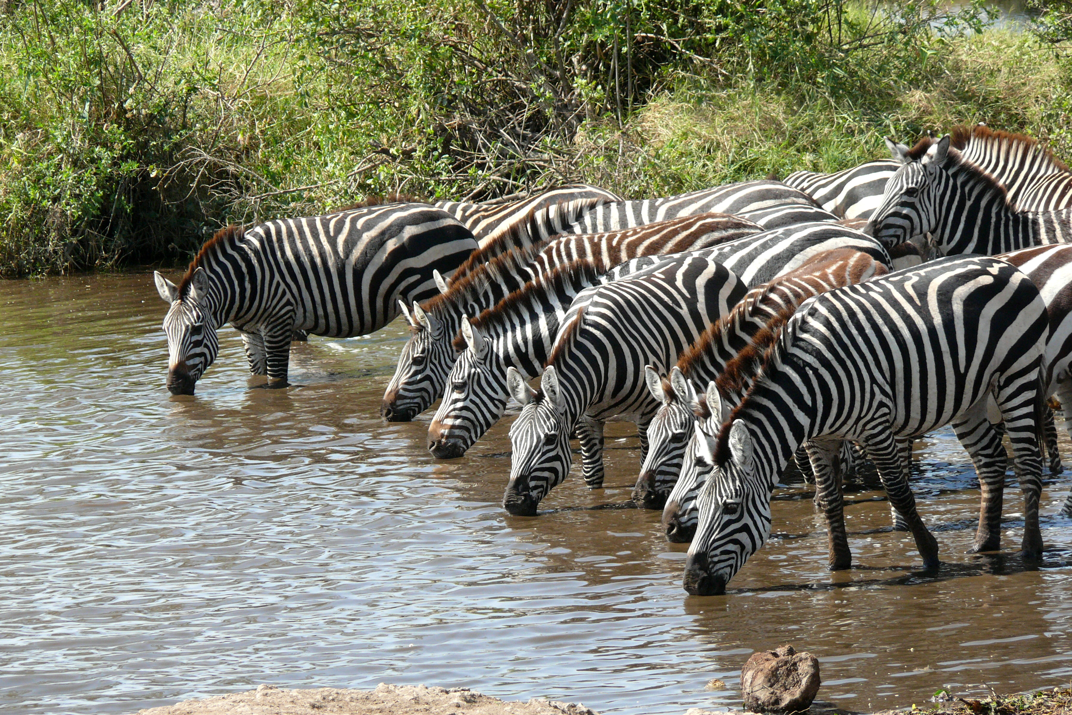 Böhm-Zebra (Equus quagga boehmi), Serengeti National Park, Tanzania